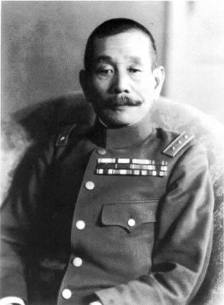 松井石根,Iwane Matui,Matui Iwane